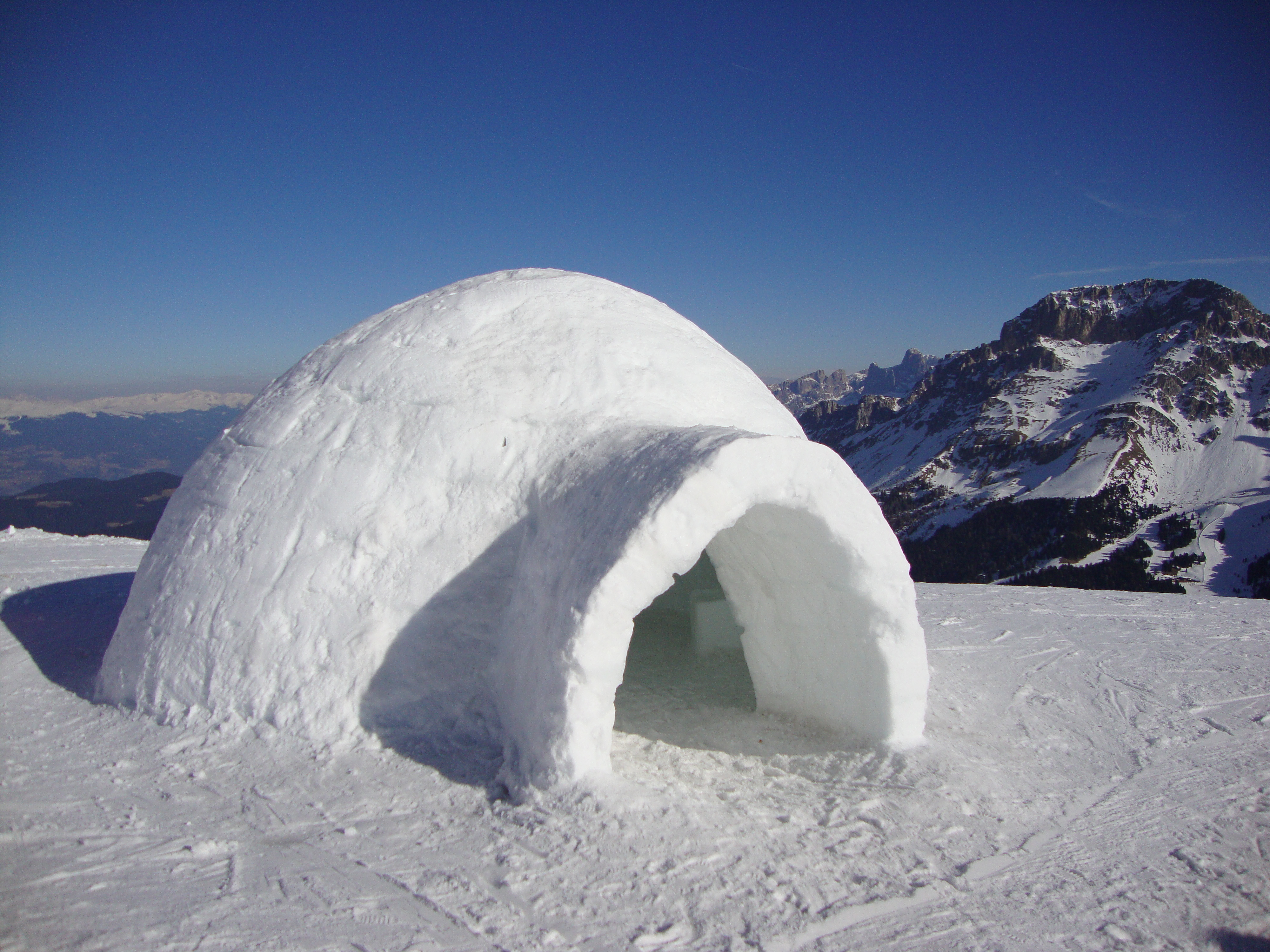 un igloo ma non siamo in alaska ma nei pressi della Pala di Santa